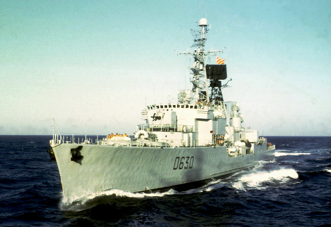 Escorteur d'Escadre Du Chayla en 1970